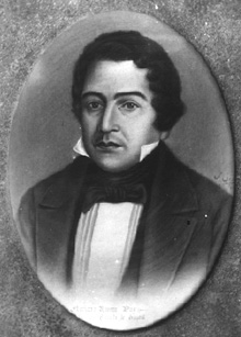 Mariano Rivera Paz, Primer Presidente de Guatemala